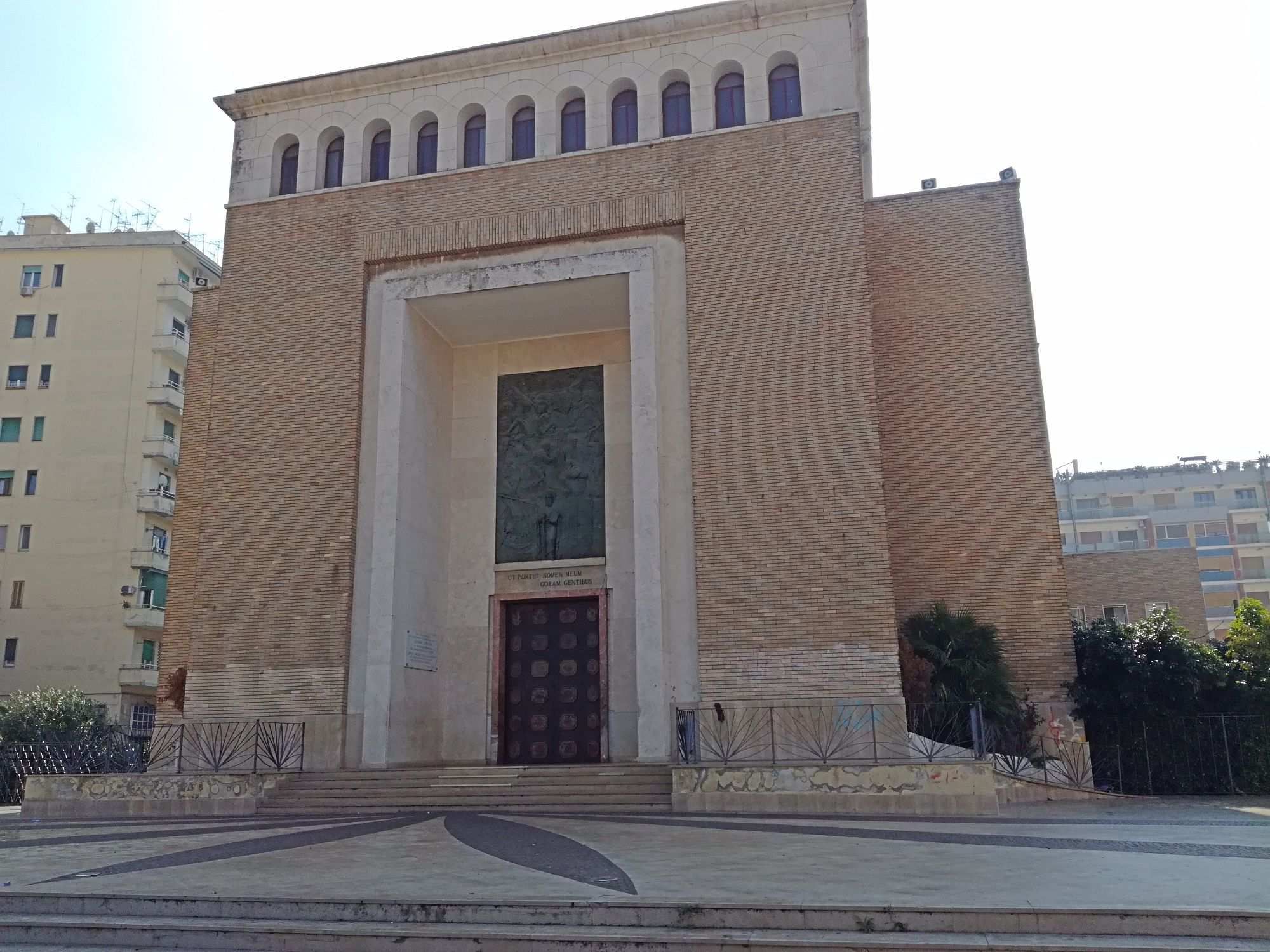 Chiesa di San Vitale Martire (Napoli, fuorigrotta)